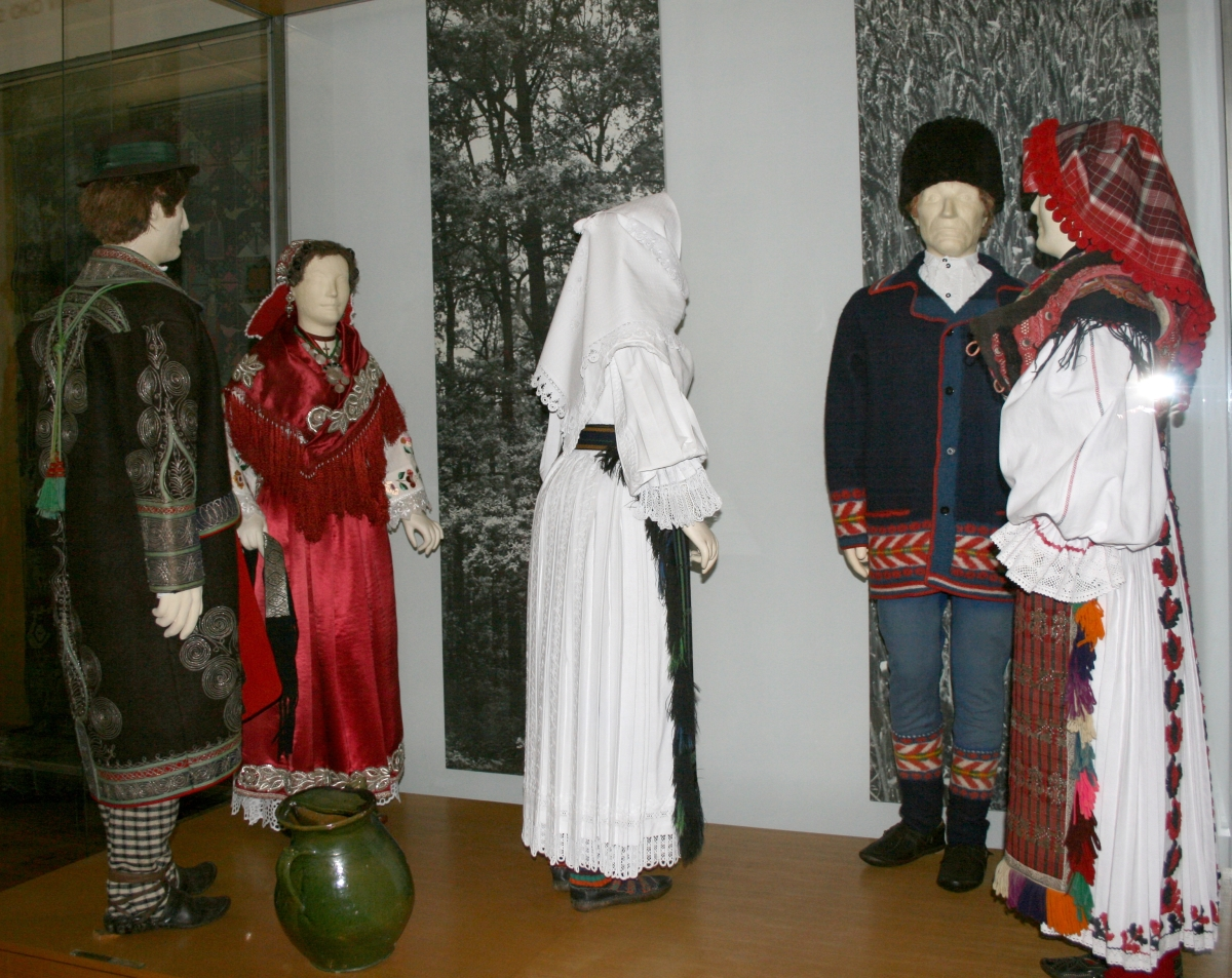 snimljeno tijekom Noći muzeja u Etnografskom muzeju u Zagrebu